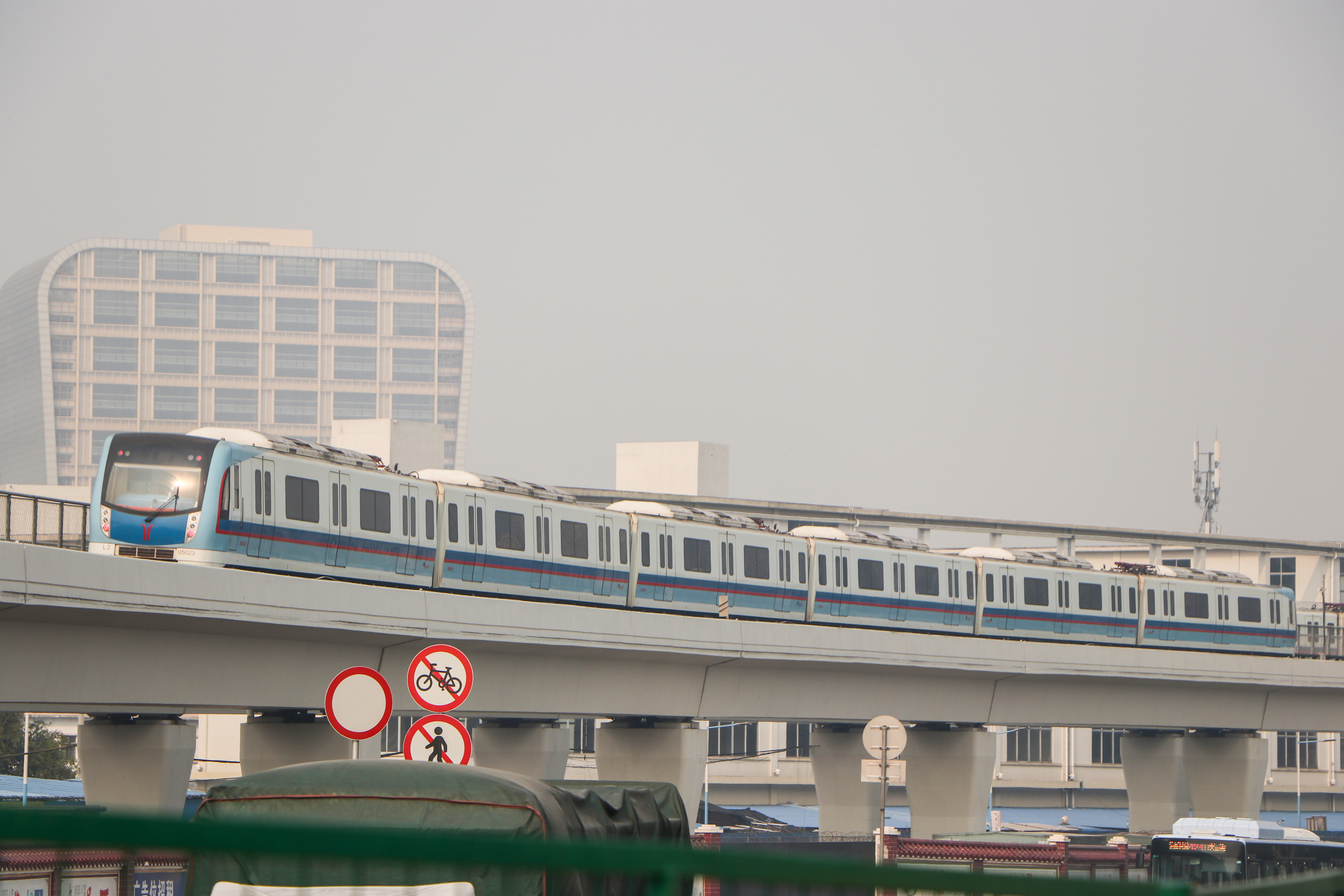 广州地铁5号线L2型列车（023024）即将到达坦尾站